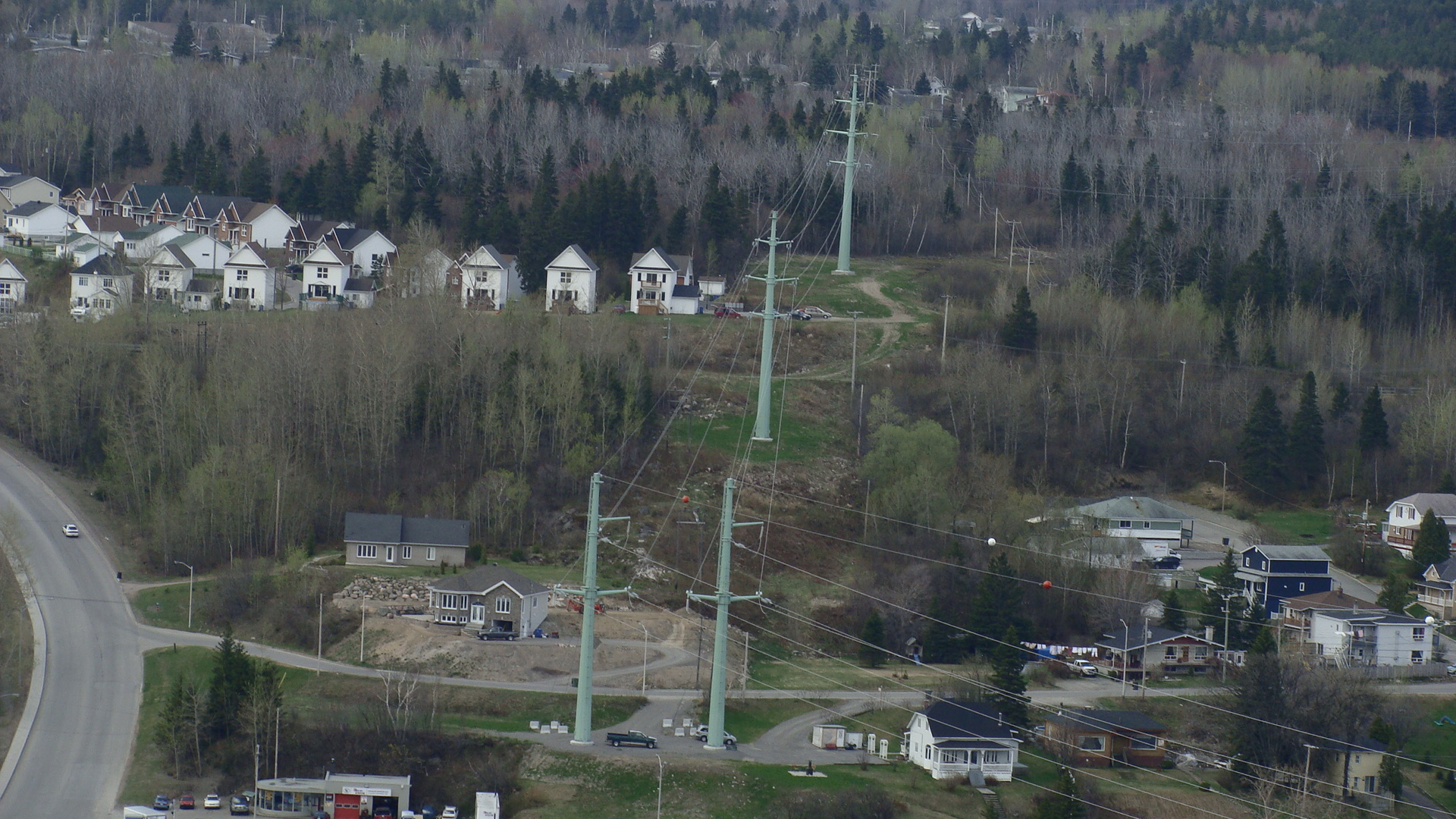 Pylônes près de la rivière Saguenay, dans les environs de la côte Réserve de Chicoutimi, à la ville de Saguenay, dans la province de Québec, au Canada.